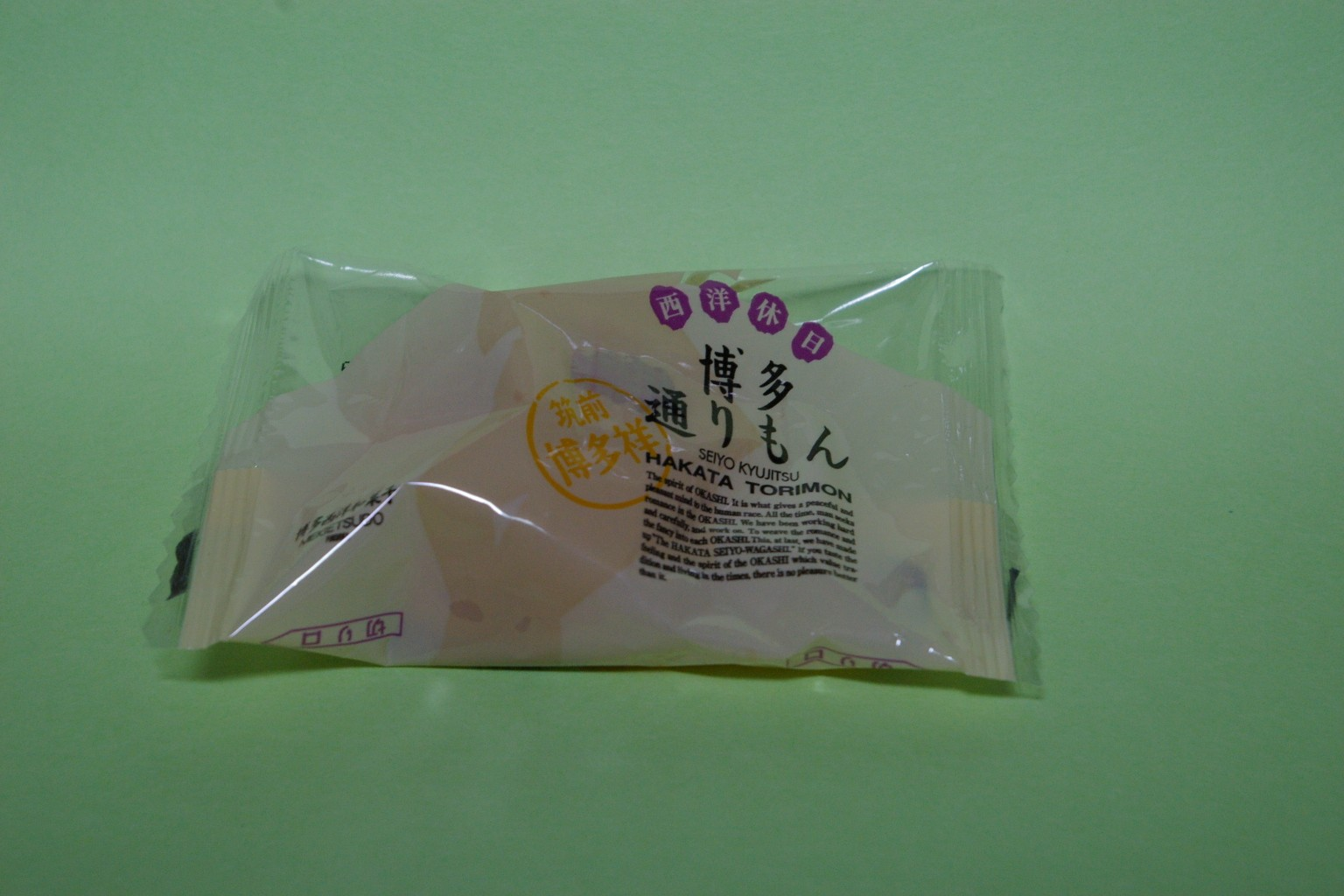 通りもん、福岡市内で撮影